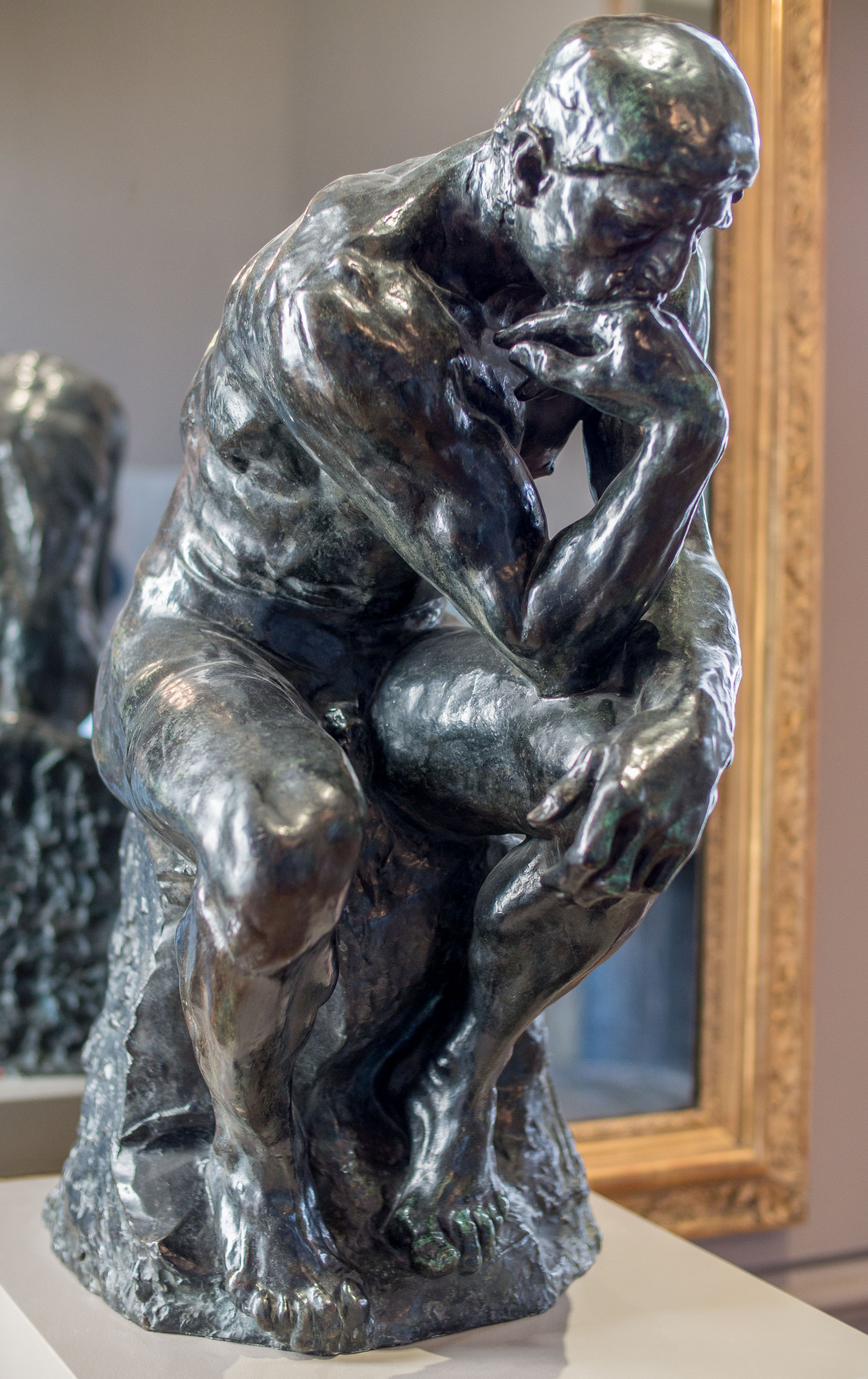 Auguste Rodin, "Le Penseur" (taille originale), 1881-1882, Sculpture (bronze), fonte Alexis Rudier, 1917, Musée Rodin, Paris, France